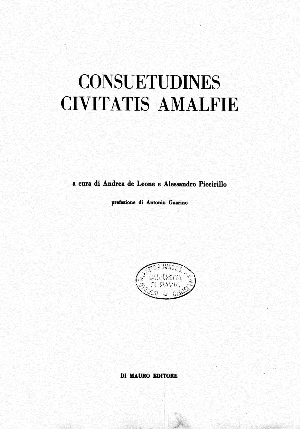 Frontespizio